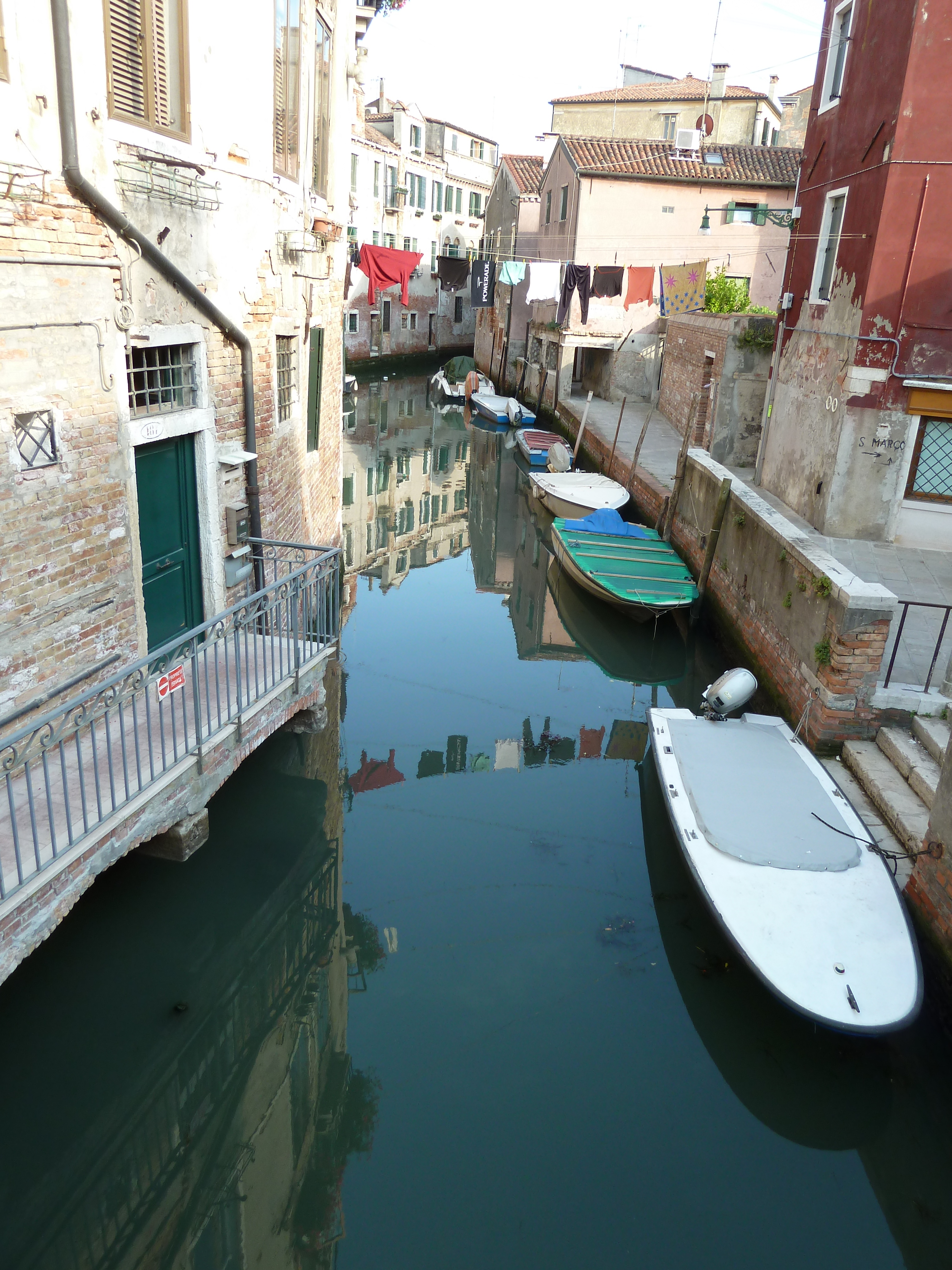 riello